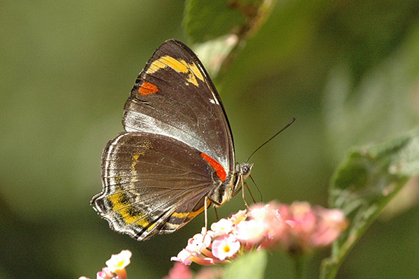 Jezebel Nymph (Mynes geoffroyi)